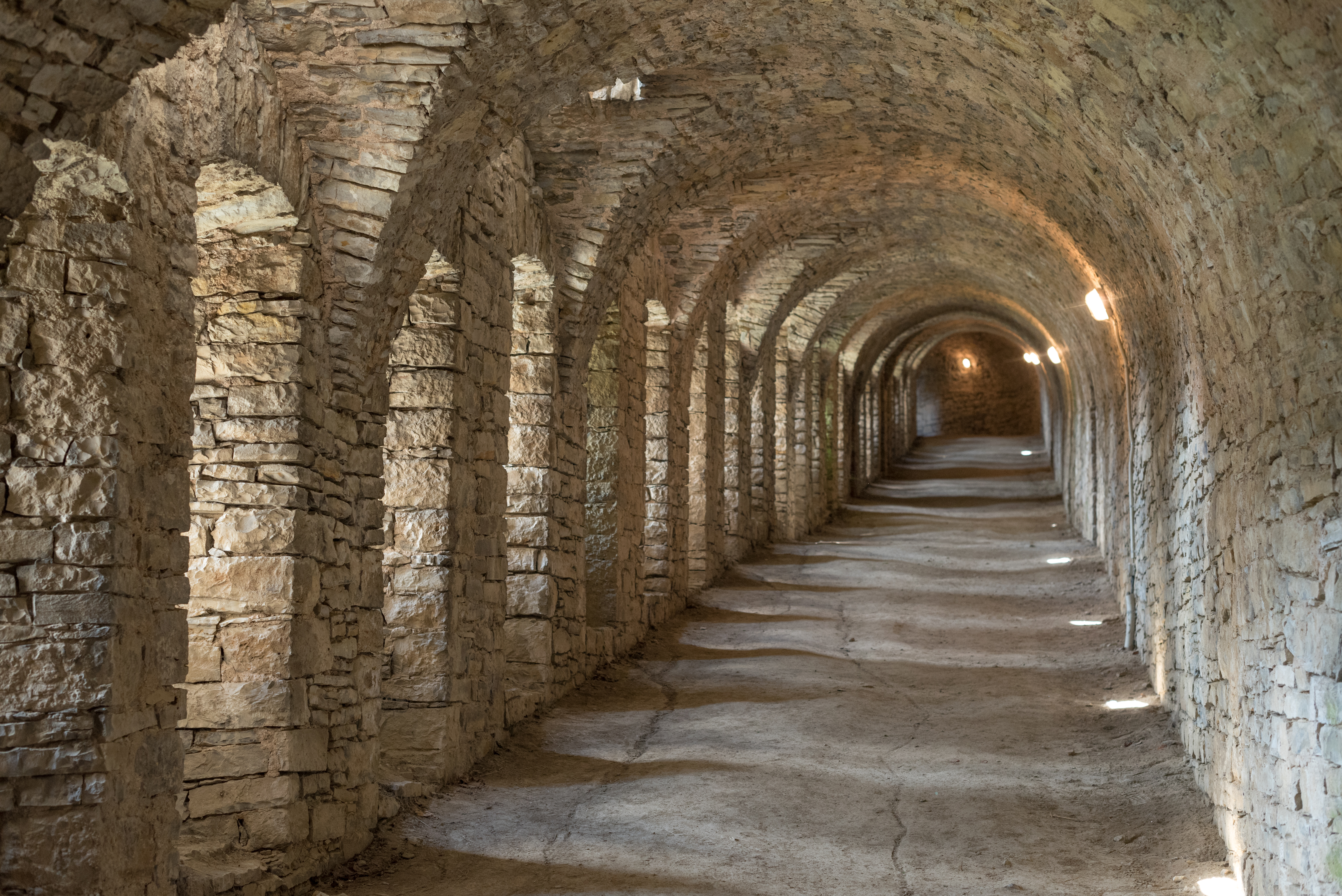 Würzburg, Festung Marienberg, Kasematten